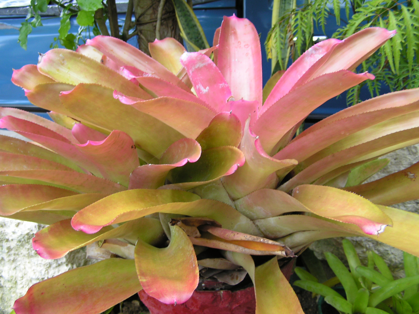 bromeliad